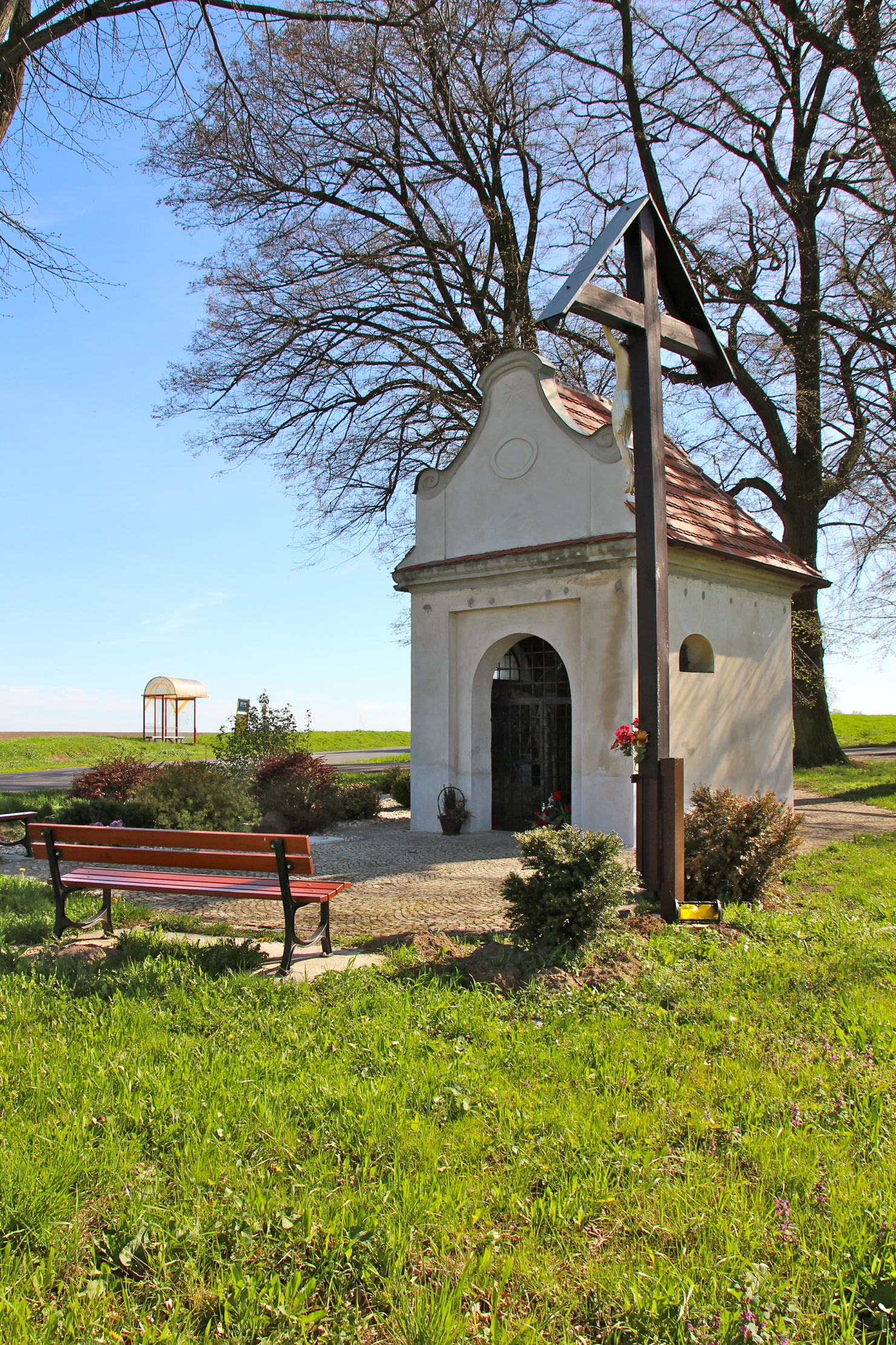 Głogowiec wieś w Polsce położona w województwie opolskim, w powiecie prudnickim, w gminie Głogówek.